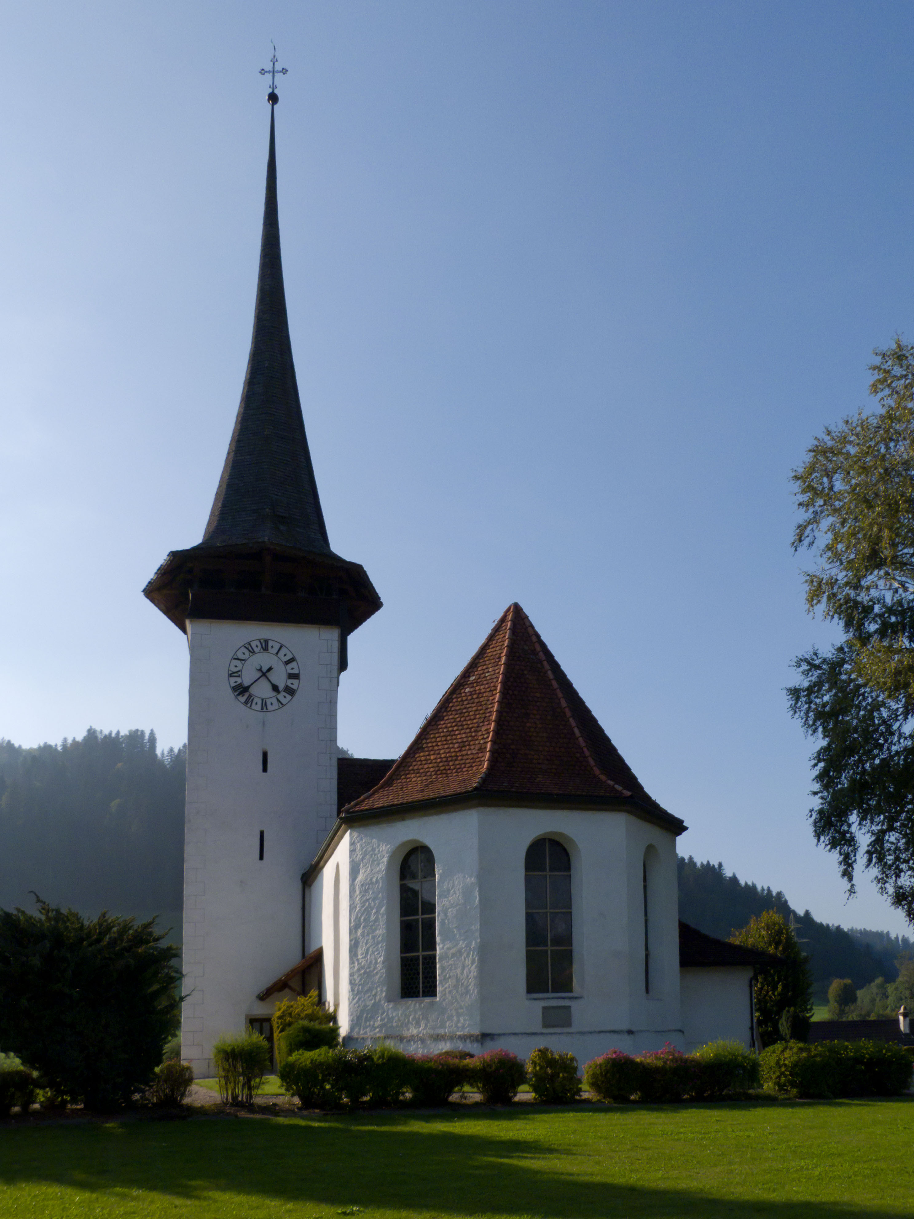 Lauperswil, Kirche erbaut 1618, Apsis und Turm